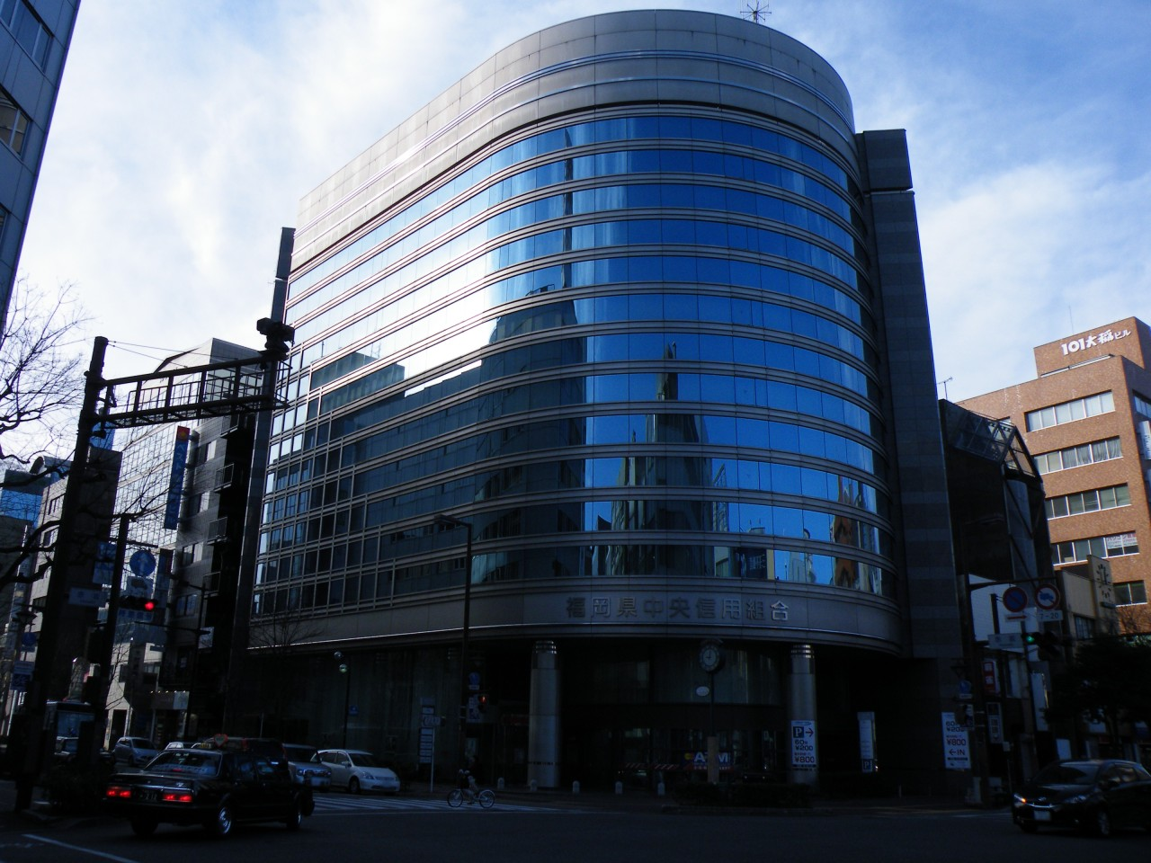 福岡県中央信用組合本店（福岡市中央区）